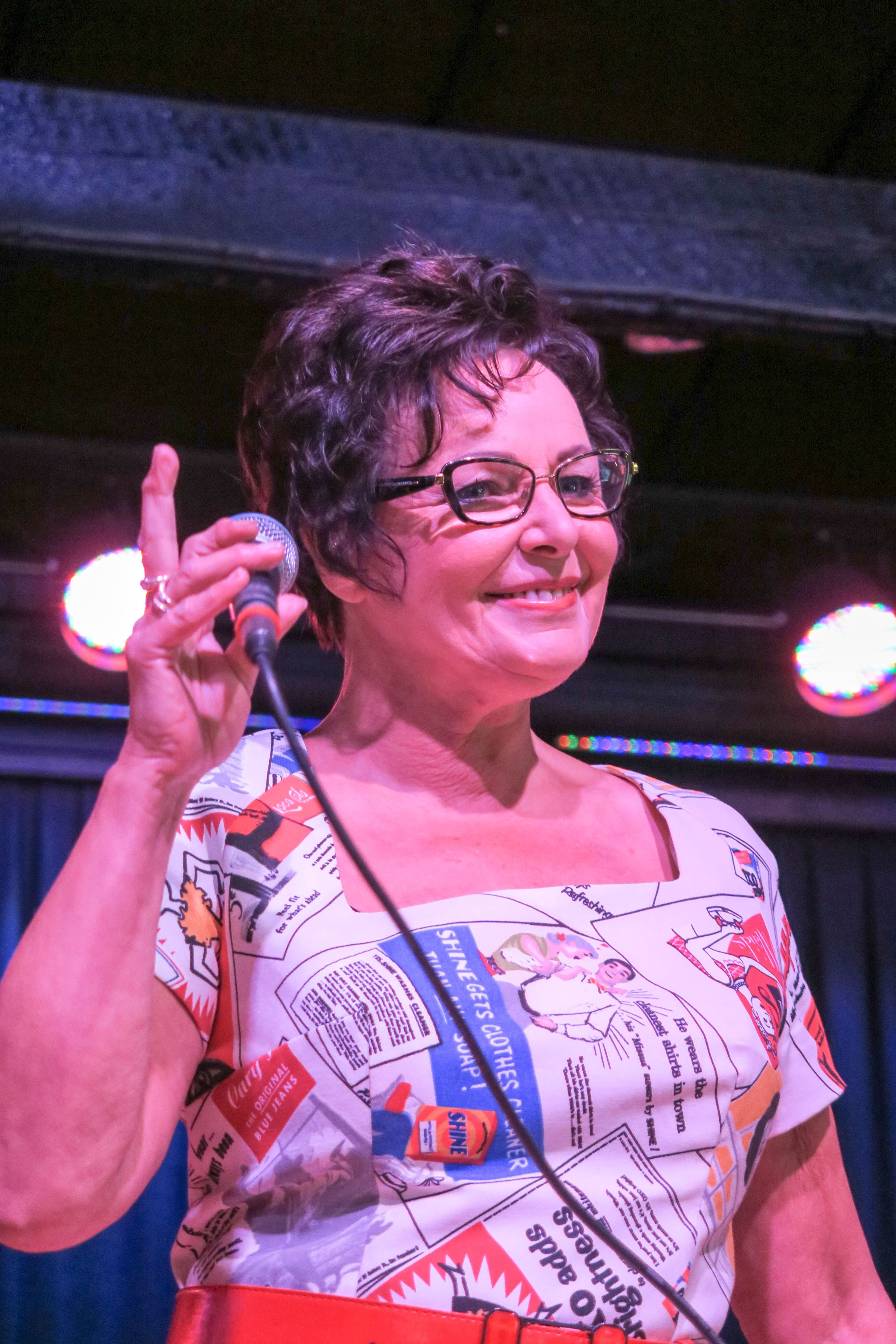 Kaija Pohjola suomalainen laulaja